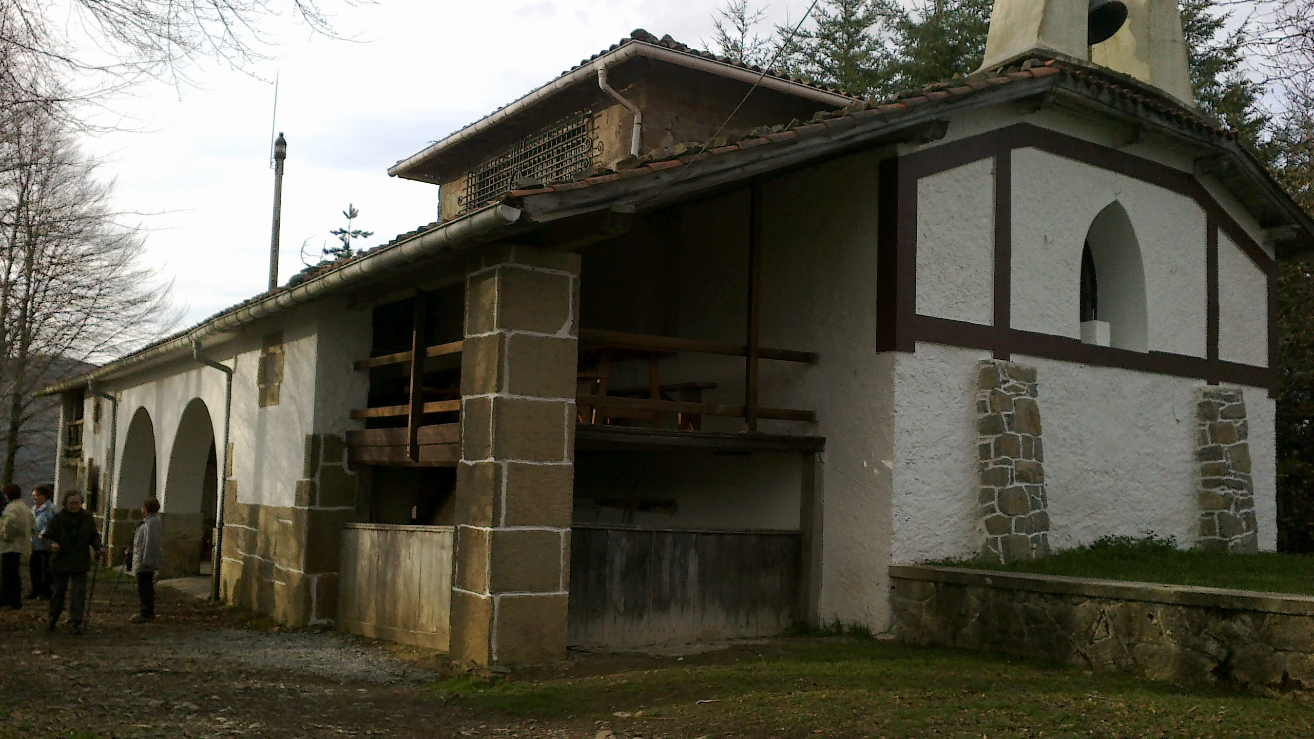 Kizkitzako baseliza (Ezkio-Itsaso, Gipuzkoa), hegoaldetik